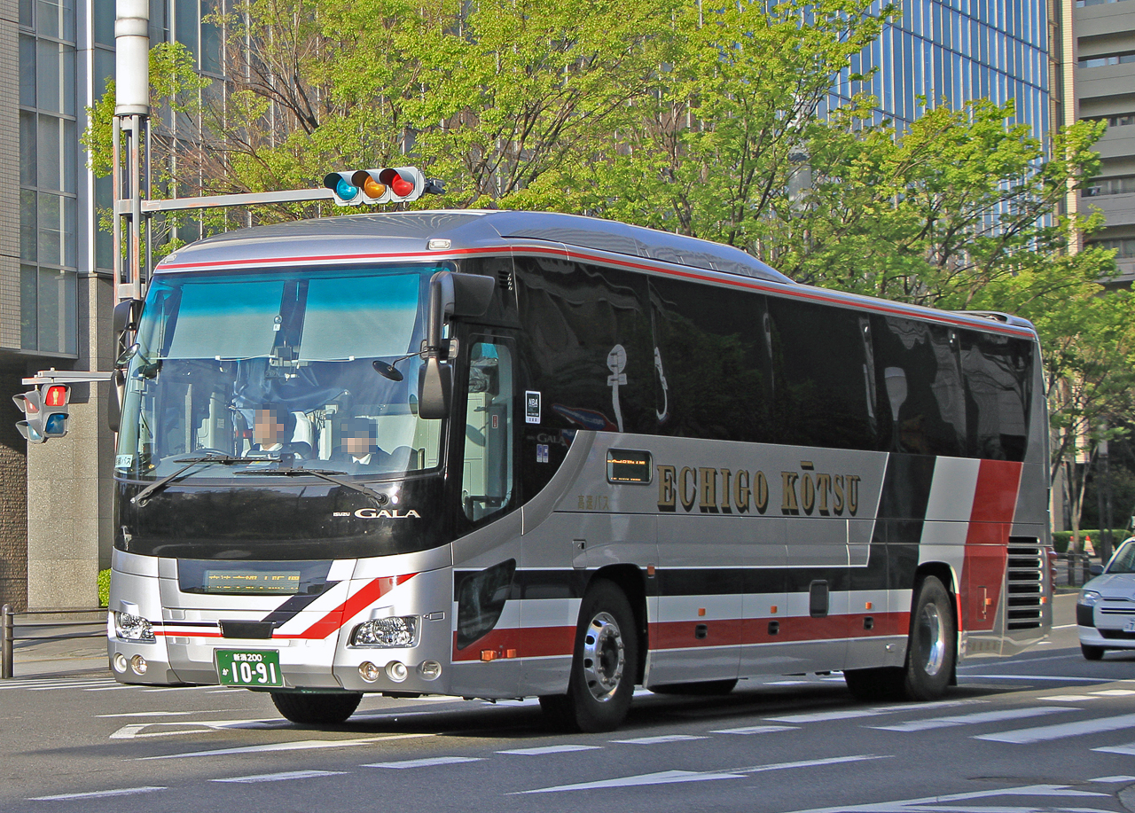 登録番号 新潟200か10-91 越後交通㈱三条営業所所属 夜行用車両 2019年4月16日 大阪市内にて撮影 撮影者 Zondag2000